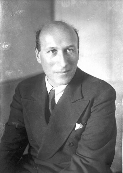 קראל שלמון